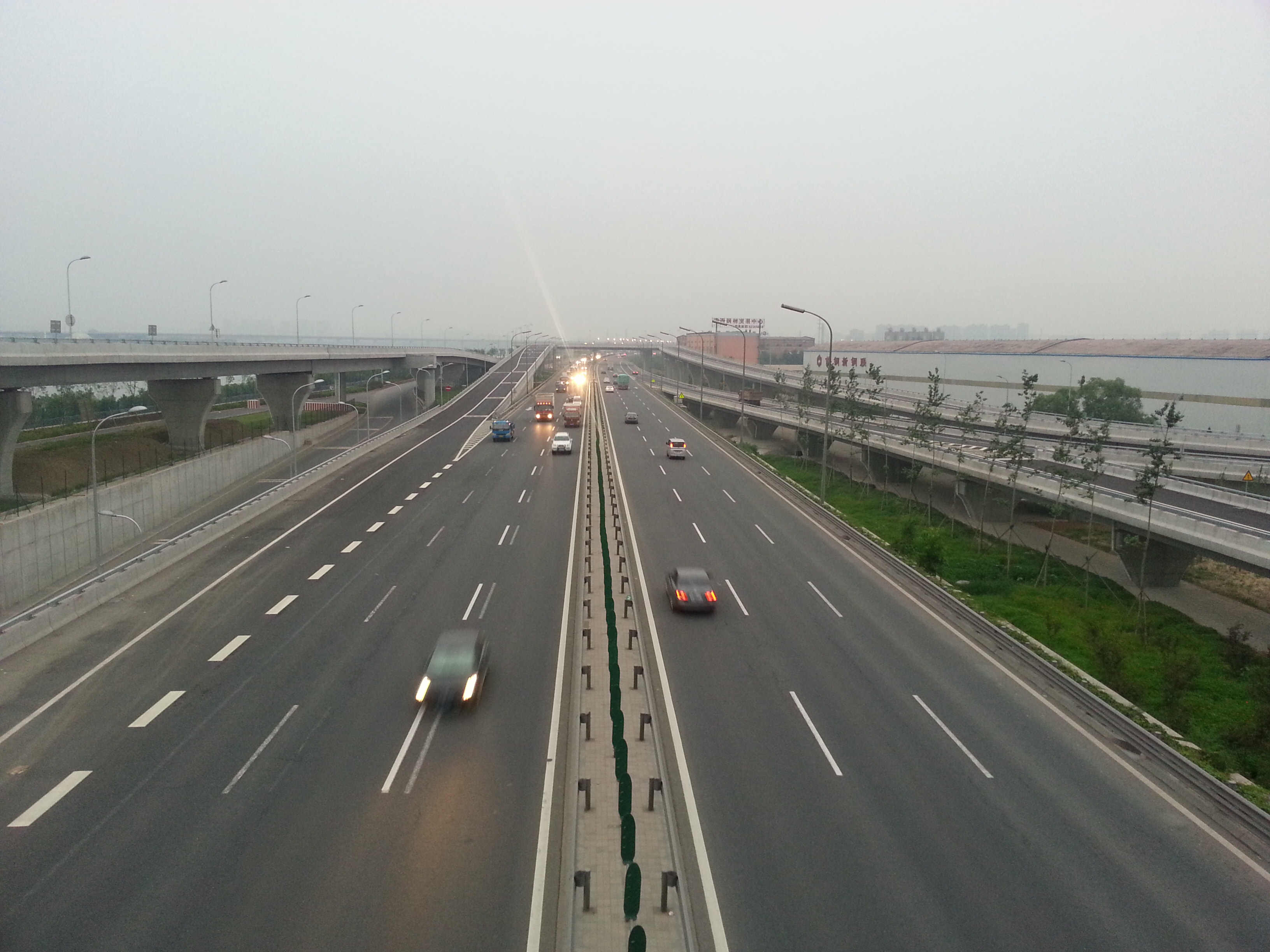 北京五环路园博桥附近